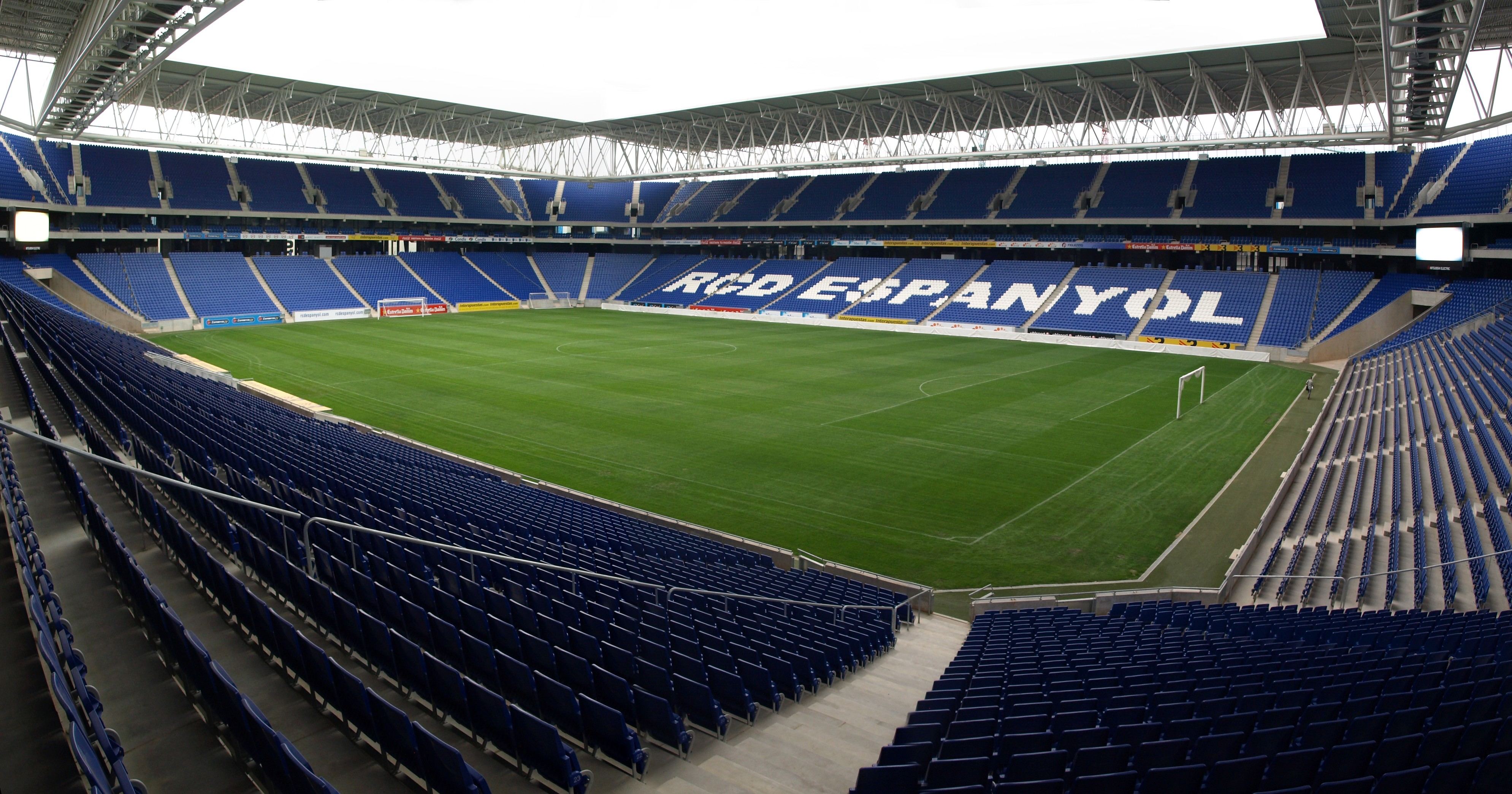 Panorámica del interior del Estadio de Cornellá-El Prat, propiedad del Real Club Deportivo Español de Barcelona.